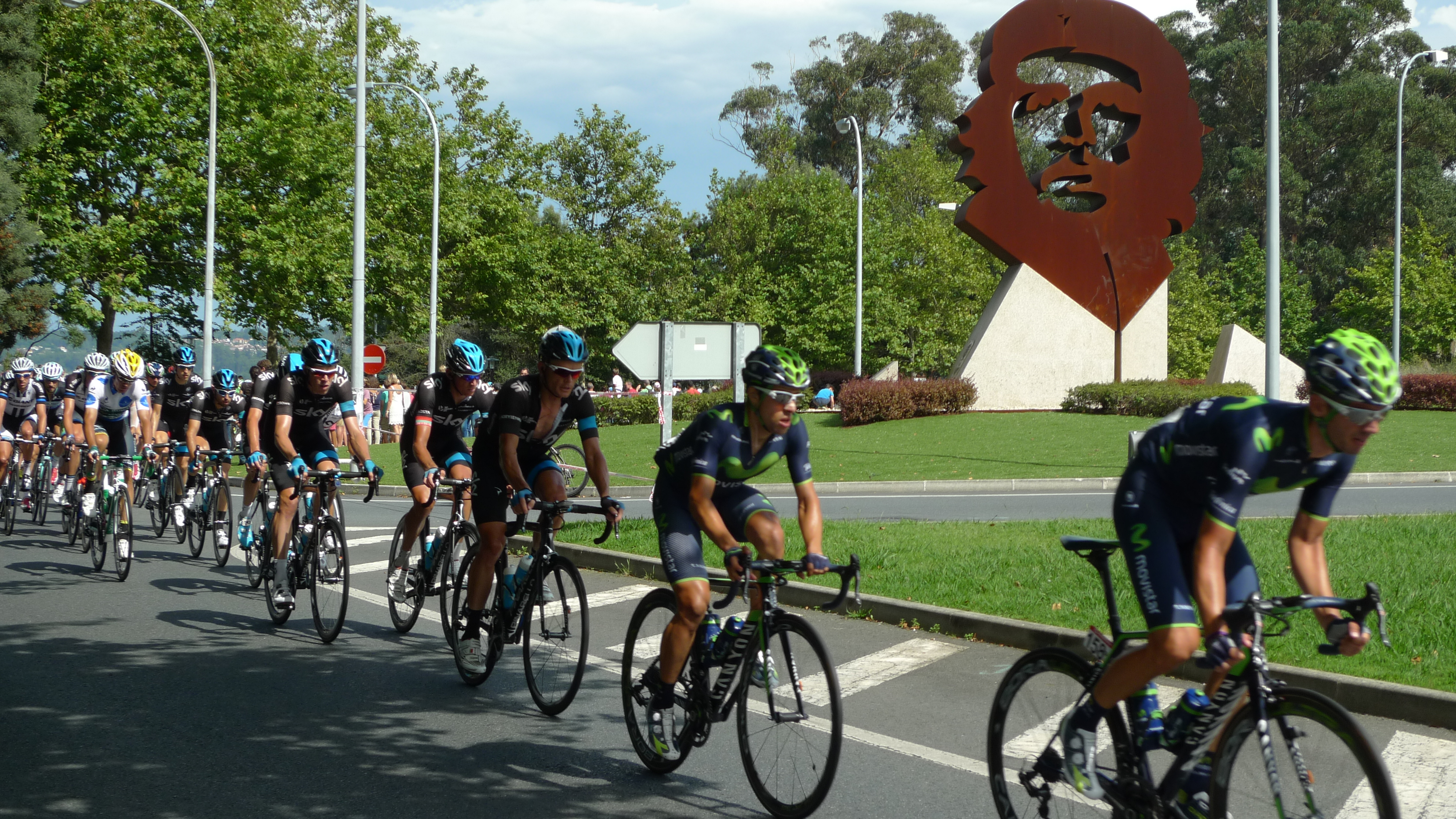 Vuelta Ciclista a España 2014 por Perillo